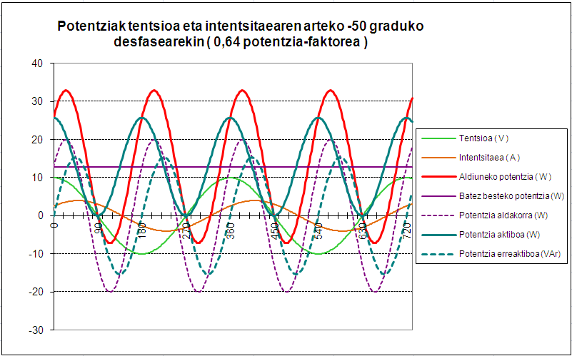 Aldiuneko potentzia elektrikoa korronte alternoko sistema batean eta bere deskonposaketa potentzia aktibo eta potentzia erreaktiboan; tentsioaren eta korrontearen arteko desfasea -50 gradukoa denean.